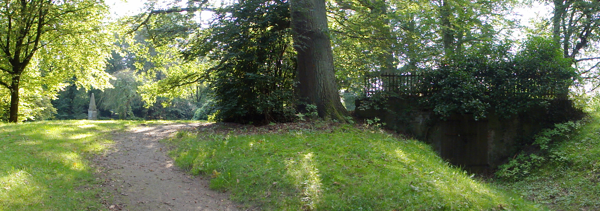 Höpkens Ruh, Landgut Schultz in Bremen, Oberneulander Landstraße 69.Die Gesamtanlage ist ein geschütztes Kulturdenkmal in der Freien Hansestadt Bremen, mit der Nr. 0609,T beim Landesamt für Denkmalpflege registriert.